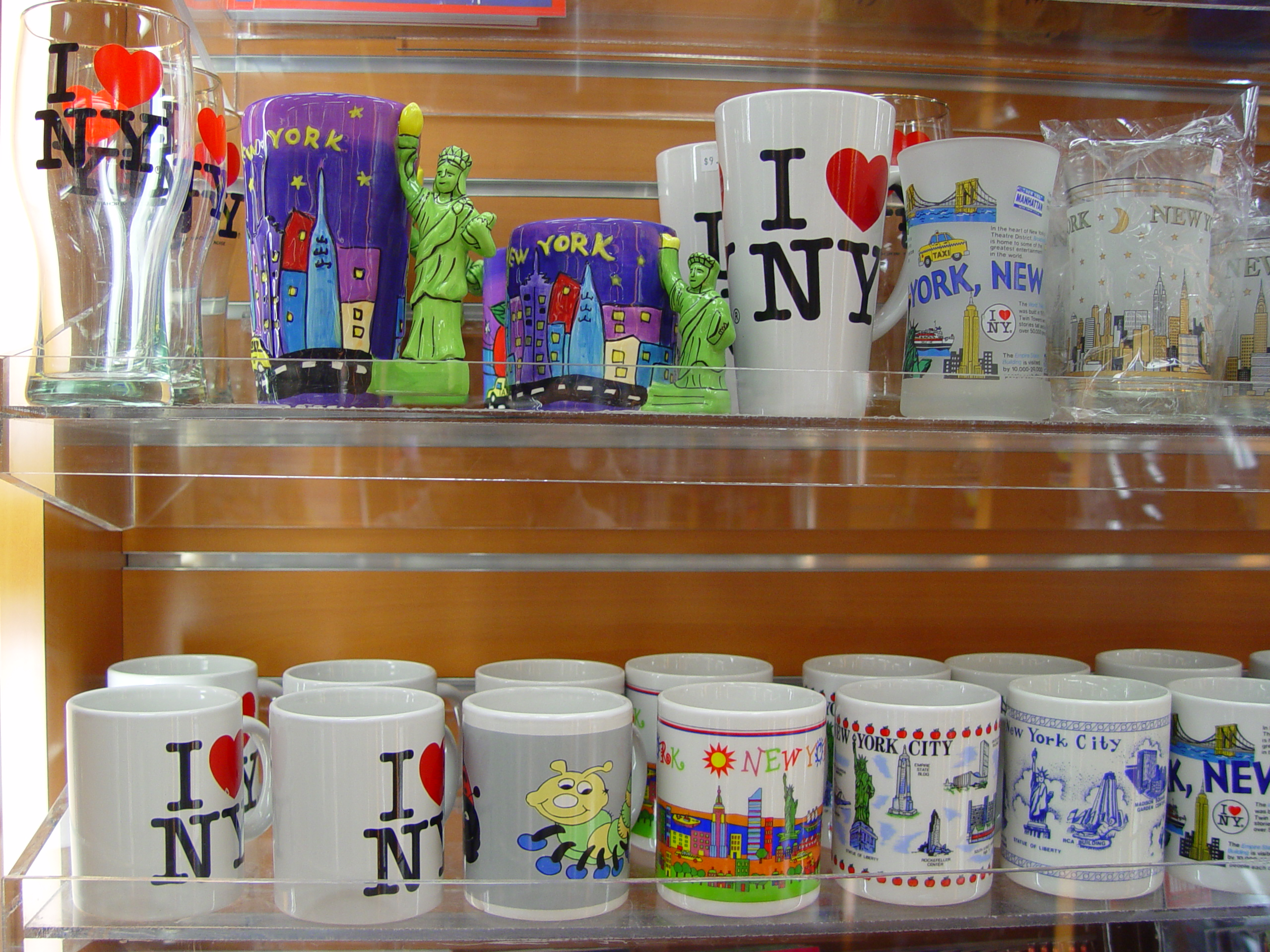 美國紐約 201New York, USA